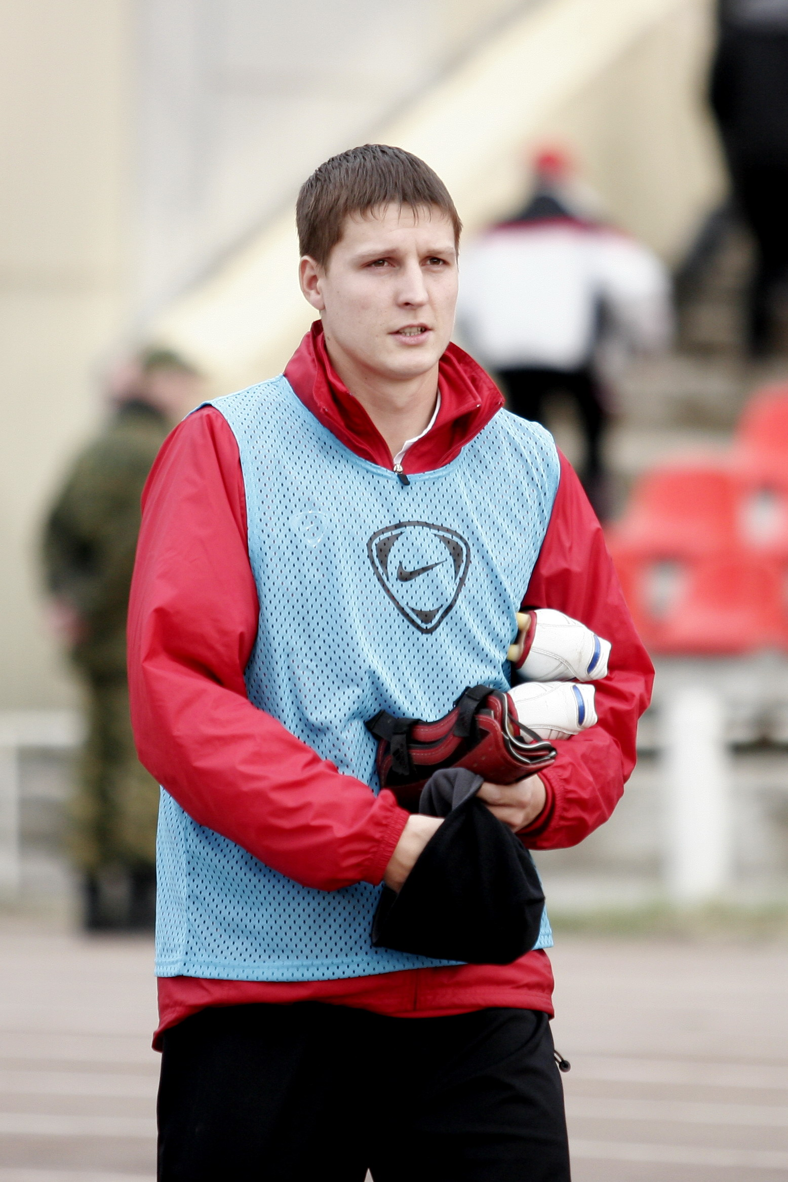 Фото сделано в городе Хабаровск, на стадионе имени Ленина. Василий Кармазиненко на разминке перед игрой.